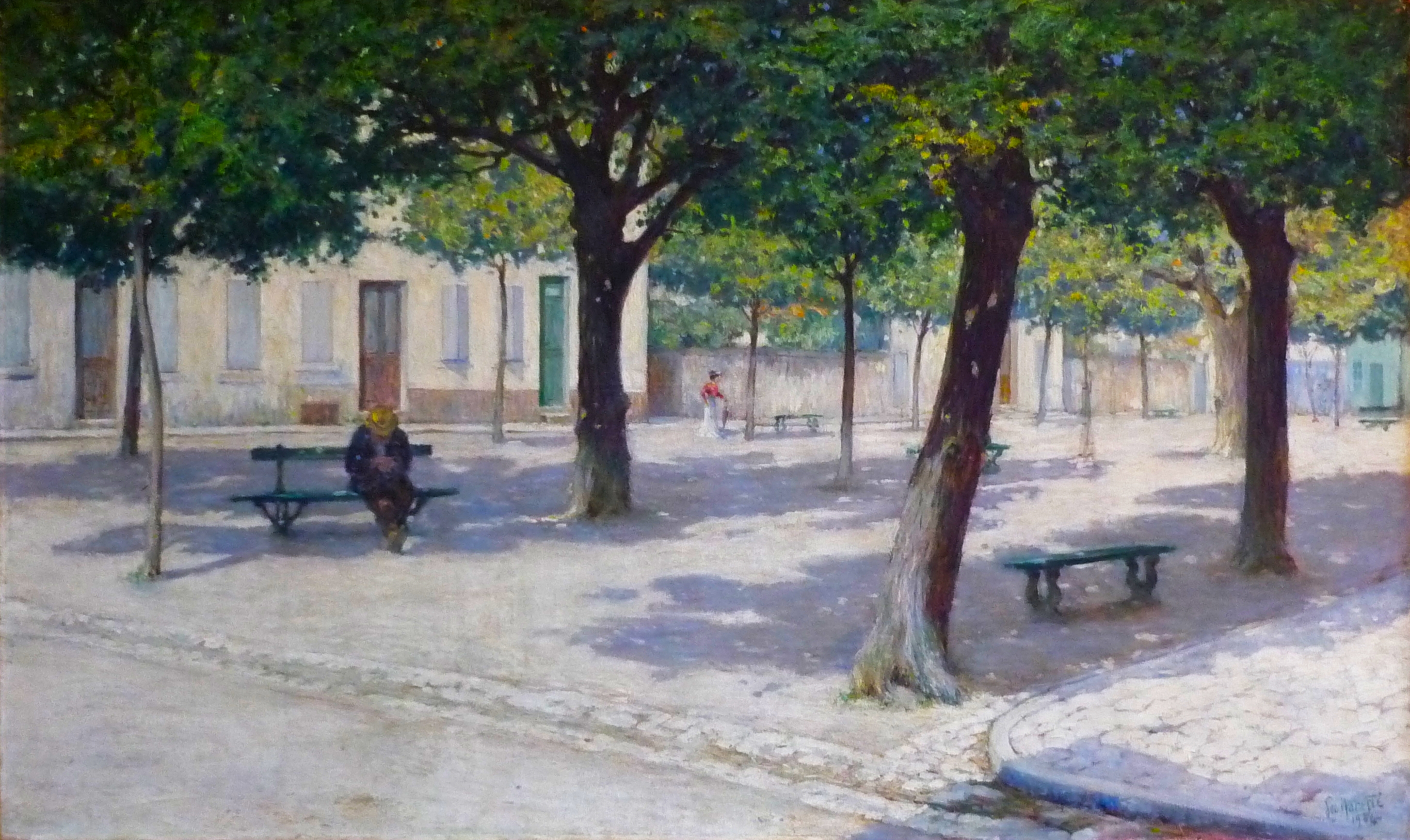 Georges Mareste (1875-1940) : La Place de la Corderie à Cognac, un jour d'été, huile sur toile (1904), Musée d'art et d'histoire de Cognac, Charente, France.